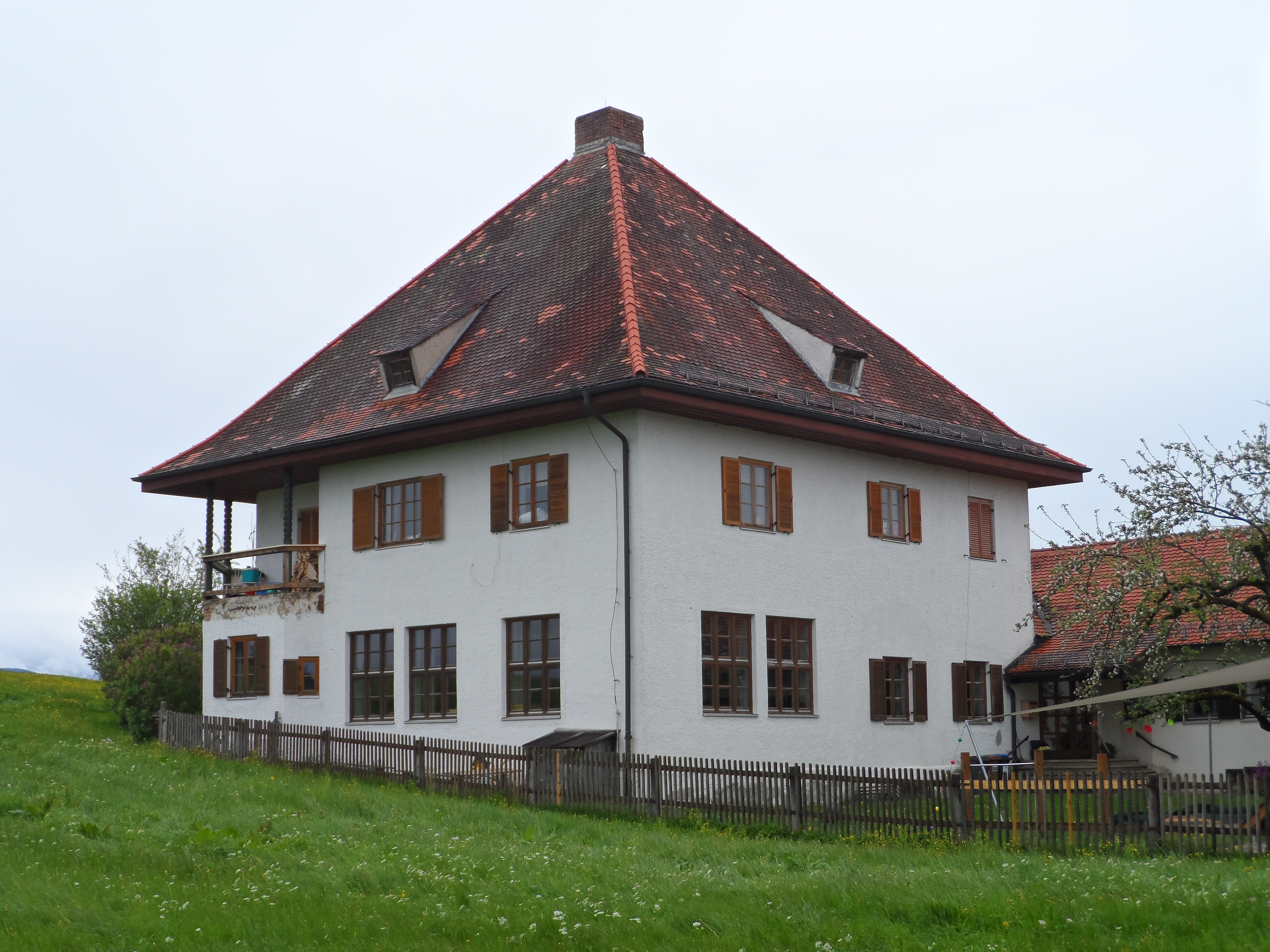 Am Sportplatz - Schöffau, Uffing am Staffelsee